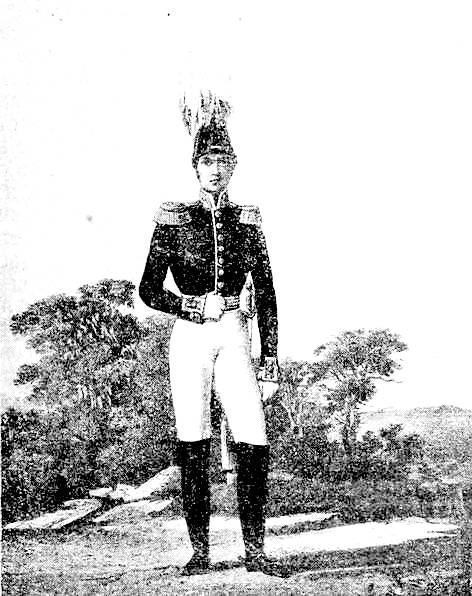 Генерал-вагенмейстер (1816—25 гг.). Данное изображение было использовано в статье «Вагенмейстер» опубликованной в пятом томе «Военной энциклопедии», который был издан книгоиздательским товариществом Ивана Дмитриевича Сытина в 1911 году в столице Российской империи городе Санкт-Петербурге. Изначально — иллюстрация №2394 в 17 томе Исторического описания одежды и вооружения российских войск.